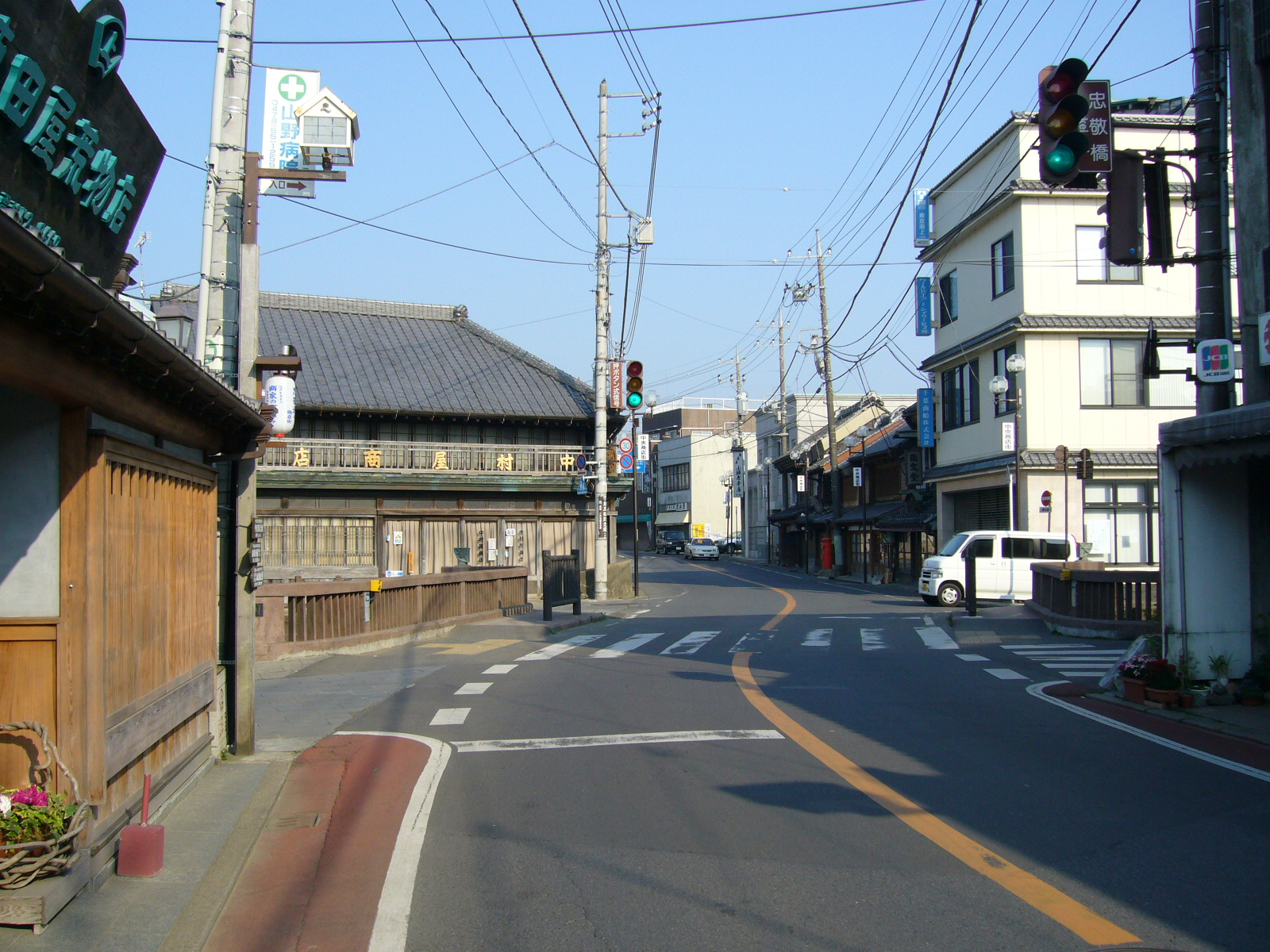 chiba route55 chukei-bridge,katori-city,japan